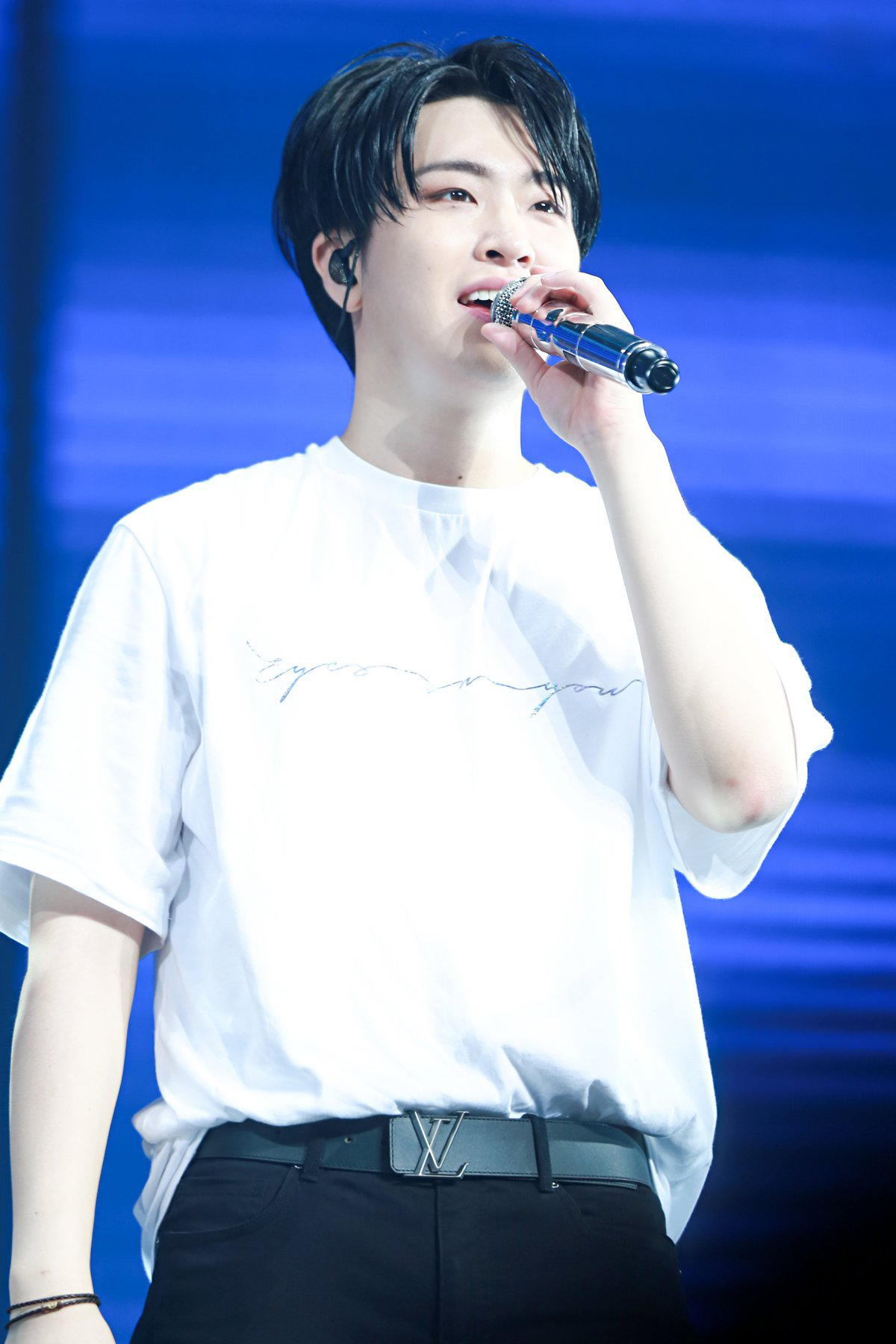 Choi Youngjae in May 2018.